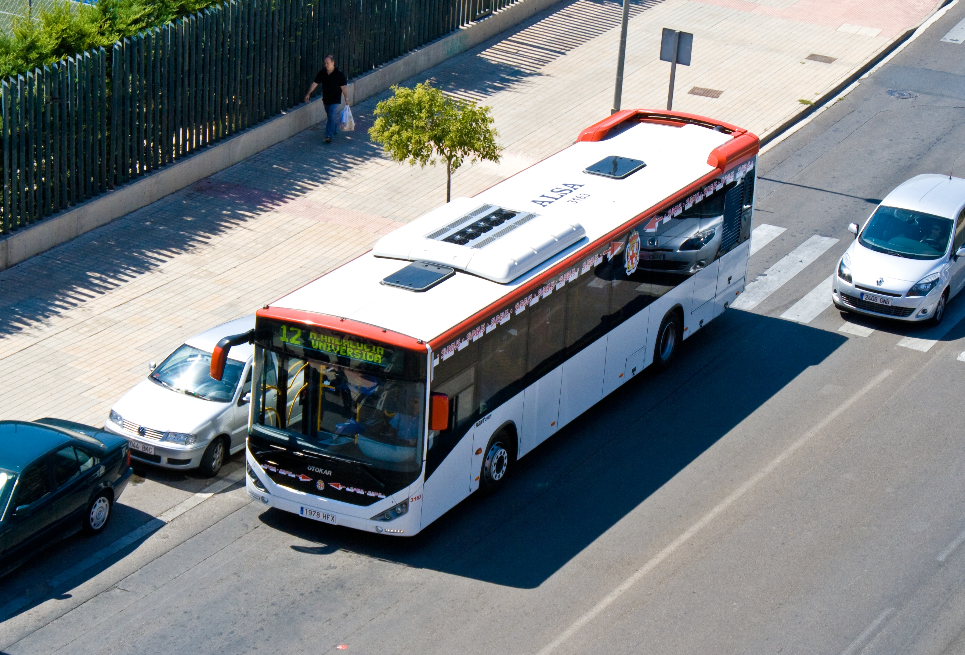 Nuevo autobús de Almería